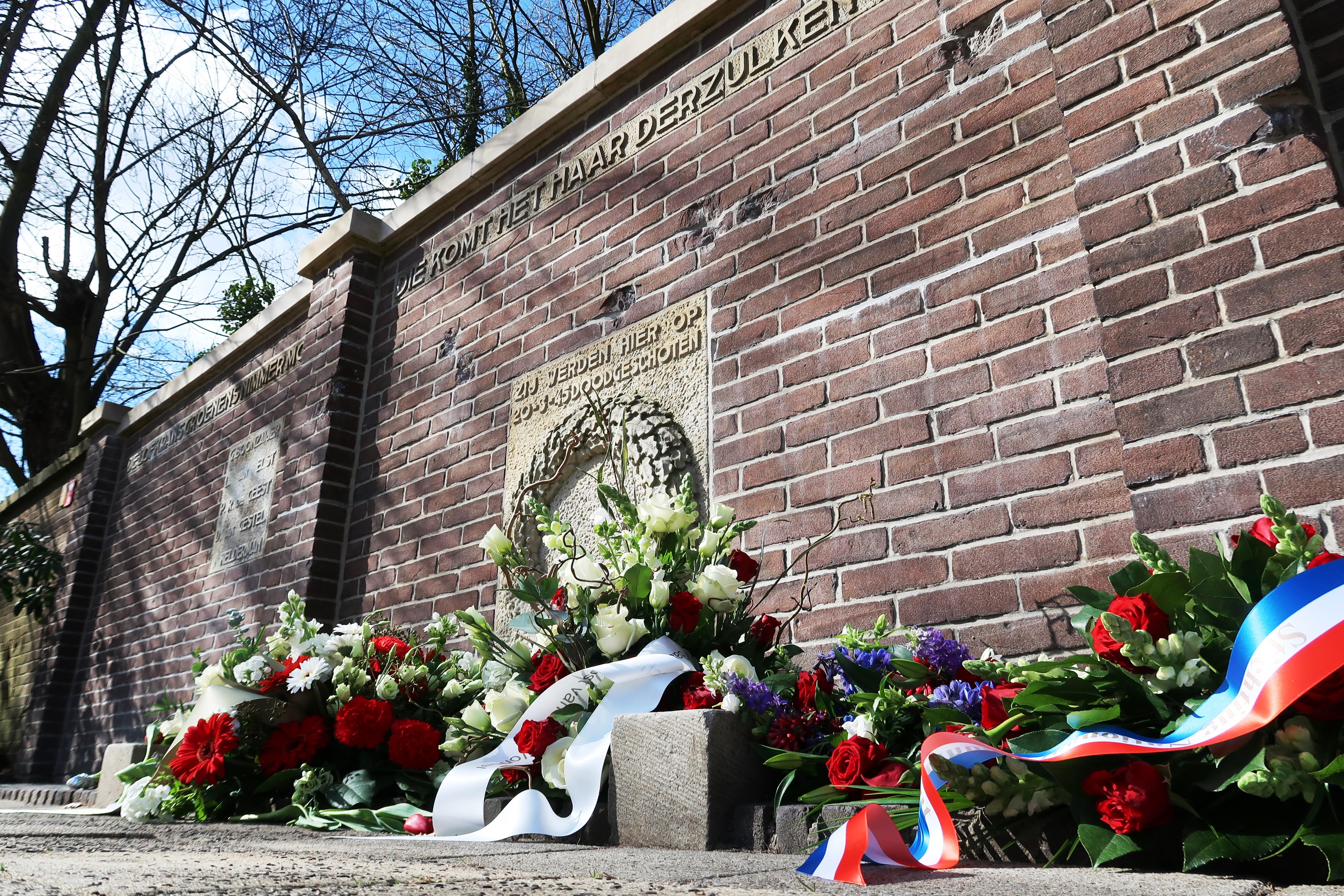 Jaarlijke herdenking Monument Appelweg